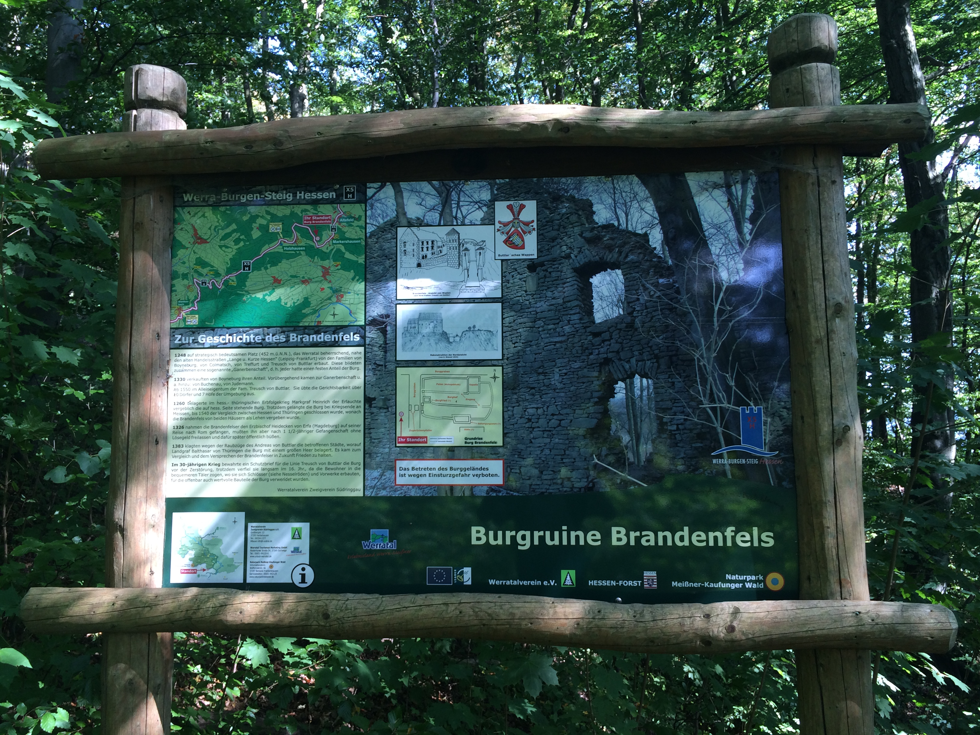 Informations- bzw. Schautafel des Werra-Burgen-Steiges Hessen (X5H) an der Ruine Brandenfels